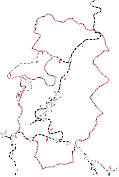 Sieć kolejowa Wałbrzycha w granicach administracyjnych miasta z 2017 r. i okolicy. Symbol czarny: czynne. Symbol szary: nieczynne lub rozebrane. A: linia Wrocław-Wałbrzych A’: przebieg w centrum miasta A”: łącznik Wałbrzych Główny - Wałbrzych Fabryczny A”’: łącznik Wałbrzych Fabryczny - Wałbrzych Miasto B: Śląska Kolej Górska odc.Zgorzelec - Wałbrzych C: Śląska Kolej Górska odc.Wałbrzych - Kłodzko D: Wałbrzyski Zespół Bocznic (fragment LK291) E: linia Wałbrzych - Mezimesti (fragment LK291) rozebrany 1994 r. F: linia Wałbrzych - Mezimesti G: linia Wrocław - Jedlina-Zdrój Stacje i przystanki a: Boguszów-Gorce b: Boguszów-Gorce Wschód c: Szybowice Wałbrzyskie d: Wałbrzych Główny e: Jedlina Górna f: Jedlina-Zdrój g: Jedlina Dolna h: Wałbrzych Fabryczny i: Wałbrzych Dolny j: Wałbrzych Śródmieście k: Wałbrzych Miasto l: Wałbrzych Szczawienko m: Szczawno Zdrój n: Biały Kamień o: Boguszów-Gorce Tow. Tunele: x: tunel w Unisławiu Śląskim y: tunel w Szybowicach Wałbrzyskich (rozebrany) z: tunel pod Małym Wołowcem Linie kolejowe: A+B: Linia kolejowa nr 276 C: Linia kolejowa nr 286 D: Linia kolejowa nr 869 (Wałbrzyski Zespół Bocznic) D+E+F: Linia kolejowa nr 291 (odcinek rozebrany i * obecny) G: Linia kolejowa nr 282 źródła danych: PKP Polskie Linie Kolejowe S.A.: Mapa linii kolejowych w Polsce zarządzanych przez PKP Polskie Linie Kolejowe S.A. oraz innych zarządców (pol.). plk-sa.pl, 2015-12-09. [dostęp 2016-01-02]. Andrzej Scheer: Zapomniane linie kolejowe w województwie wałbrzyskim (pol.). W: Rocznik Świdnicki 84, Towarzystwo Regionalne Ziemi Świdnickiej, Świdnica, s. 38–98 [on-line]. [dostęp 2014-08-05]. Mapa turystyczna Powiat Wałbrzyski, Skala 1:50 000. Wydanie IV powiększone. Wydawnictwo Turystyczne PLAN, Jelenia Góra: 2012. ​ISBN 978-83-62917-63-1